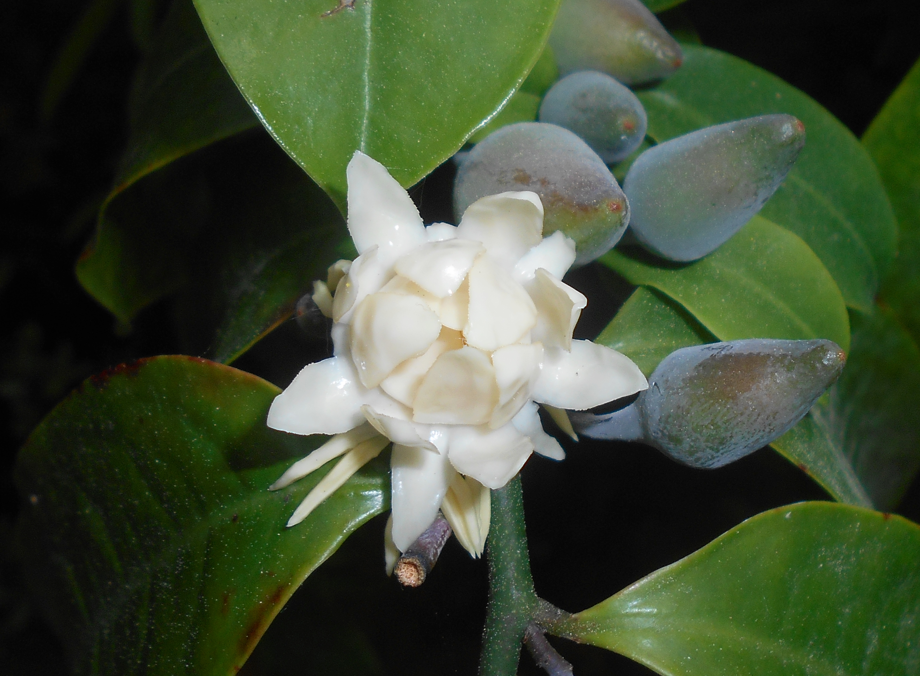 Eupomatia laurina, Botanischer Garten Berlin.